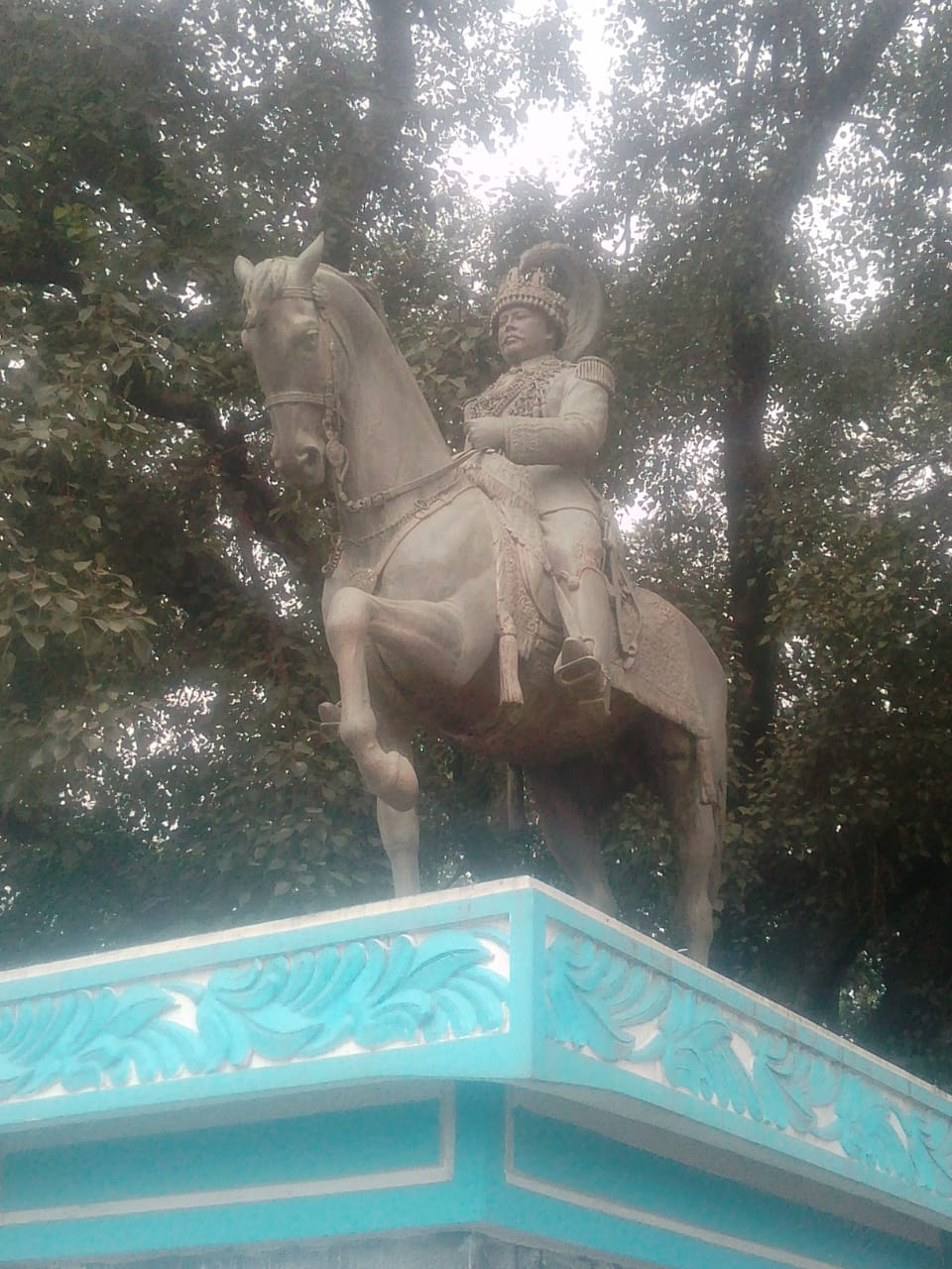 नेपाली: सिंह दरबार अगाडी भद्रकालीमा रहेको महाराज पृथ्वी वीर बिक्रमको शालिक